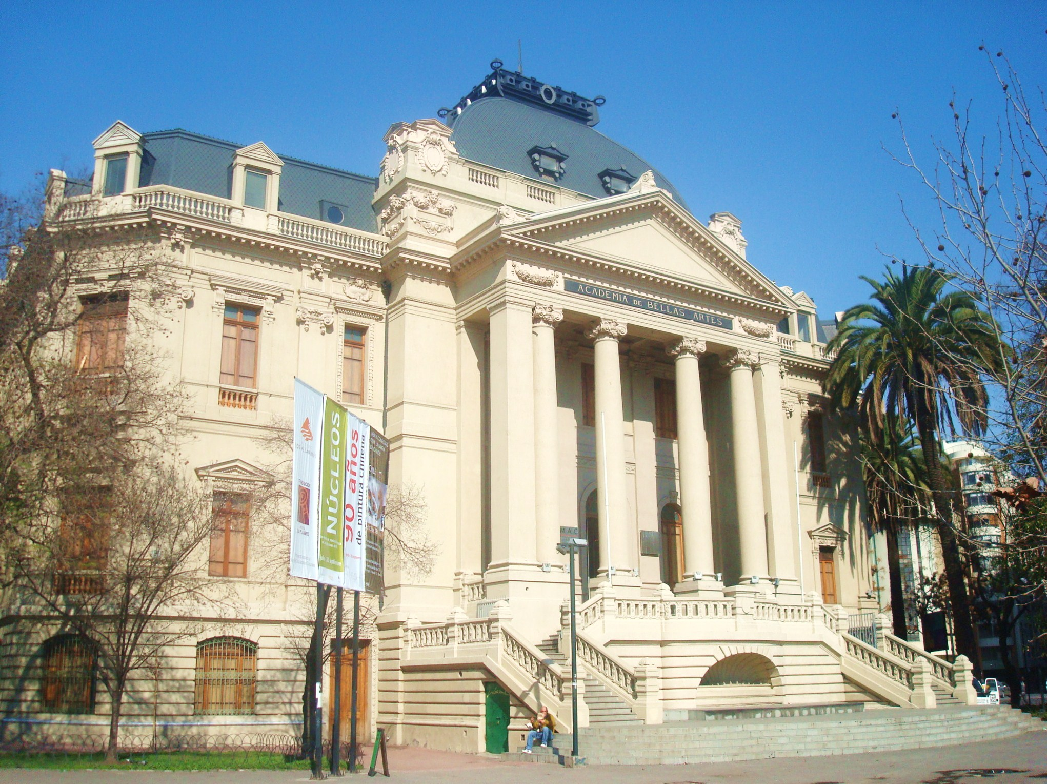 Museo de Arte Contemporáneo, Parque Forestal, Santiago de Chile